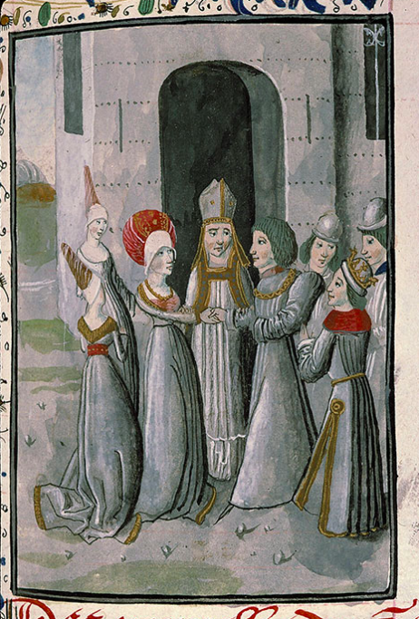 Mariage de Jeanne de Constantinople et de Ferrand de Portugal